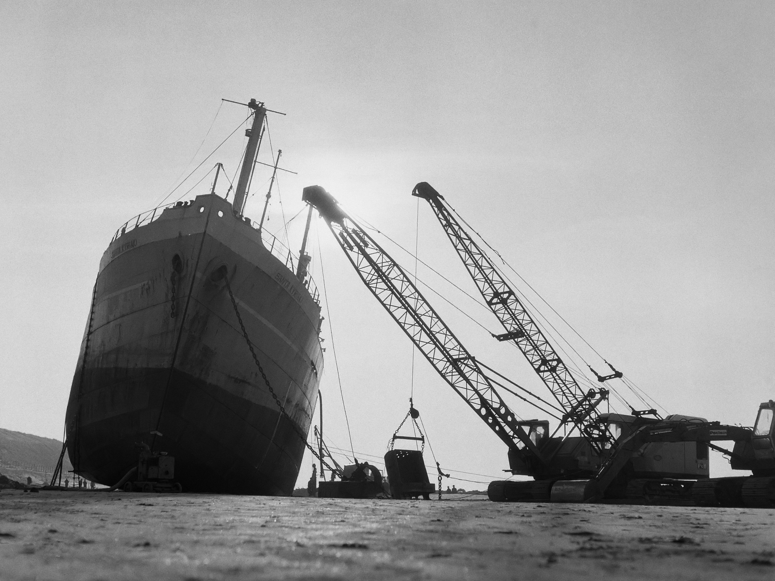 Santa Kyriaki bij IJmuiden wordt uitgegraven, draglines aan het werk 7 januari 1966